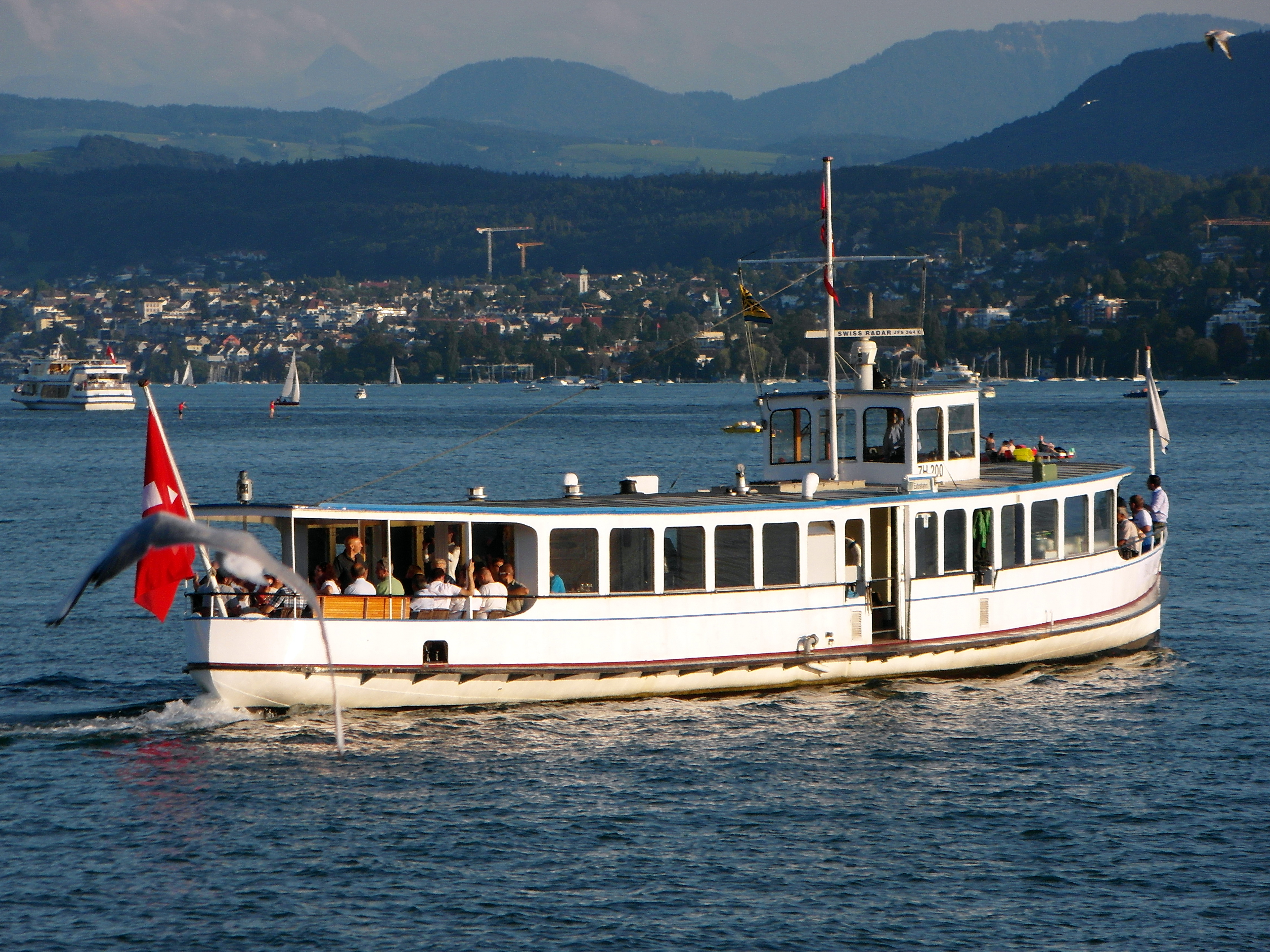 Former Zürichsee-Schifffahrtsgesellschaft (ZSG) MS Etzel as seen from Bürkliplatz (Alpenquai) in Zürich (Switzerland)